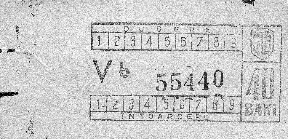 Bilet_ITB.jpg